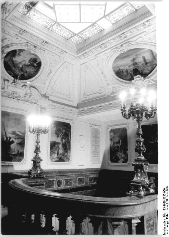 ADN-ZB Junge-30.6.1989 Berlin: Das Kaiserliche Treppenhaus im Berliner Dom-Nach mehrjährigen Restaurierungsarbeiten wurde am 30.6.1989 der ehemalige Aufgang für die Majestäten im Berliner Dom der Öffentlichkeit wieder zugänglich gemacht. Fußboden, Treppenanlage, Pilaster, Säulen und die Wandverkleidung bestehen aus verschiedenfarbigen Marmorarten.